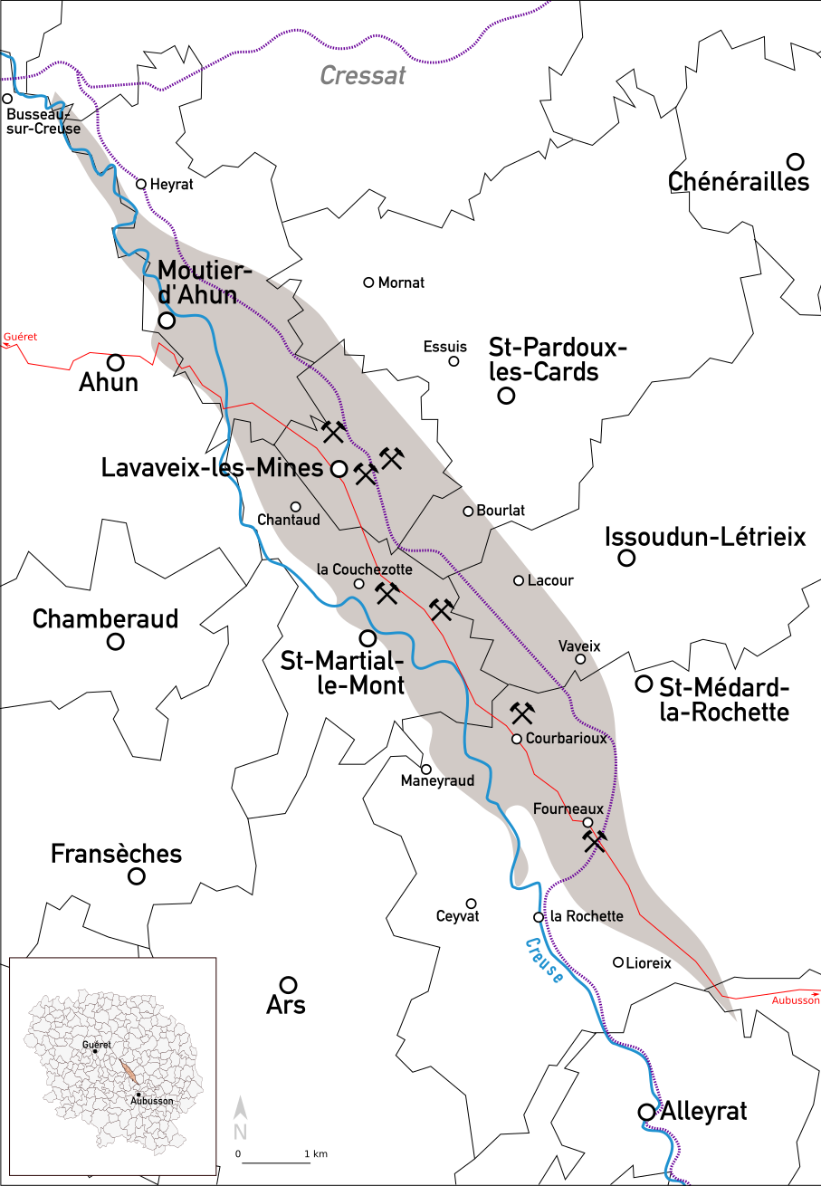 Carte du bassin d'Ahun-Lavaveix (Creuse, France).